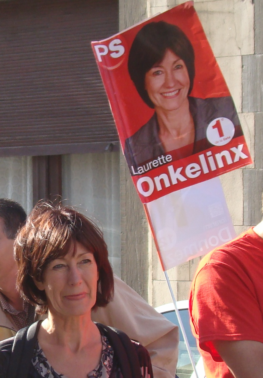 Laurette Onkelinx à la Place de Helmet, Schaerbeek, le jour de la journée sans voiture.